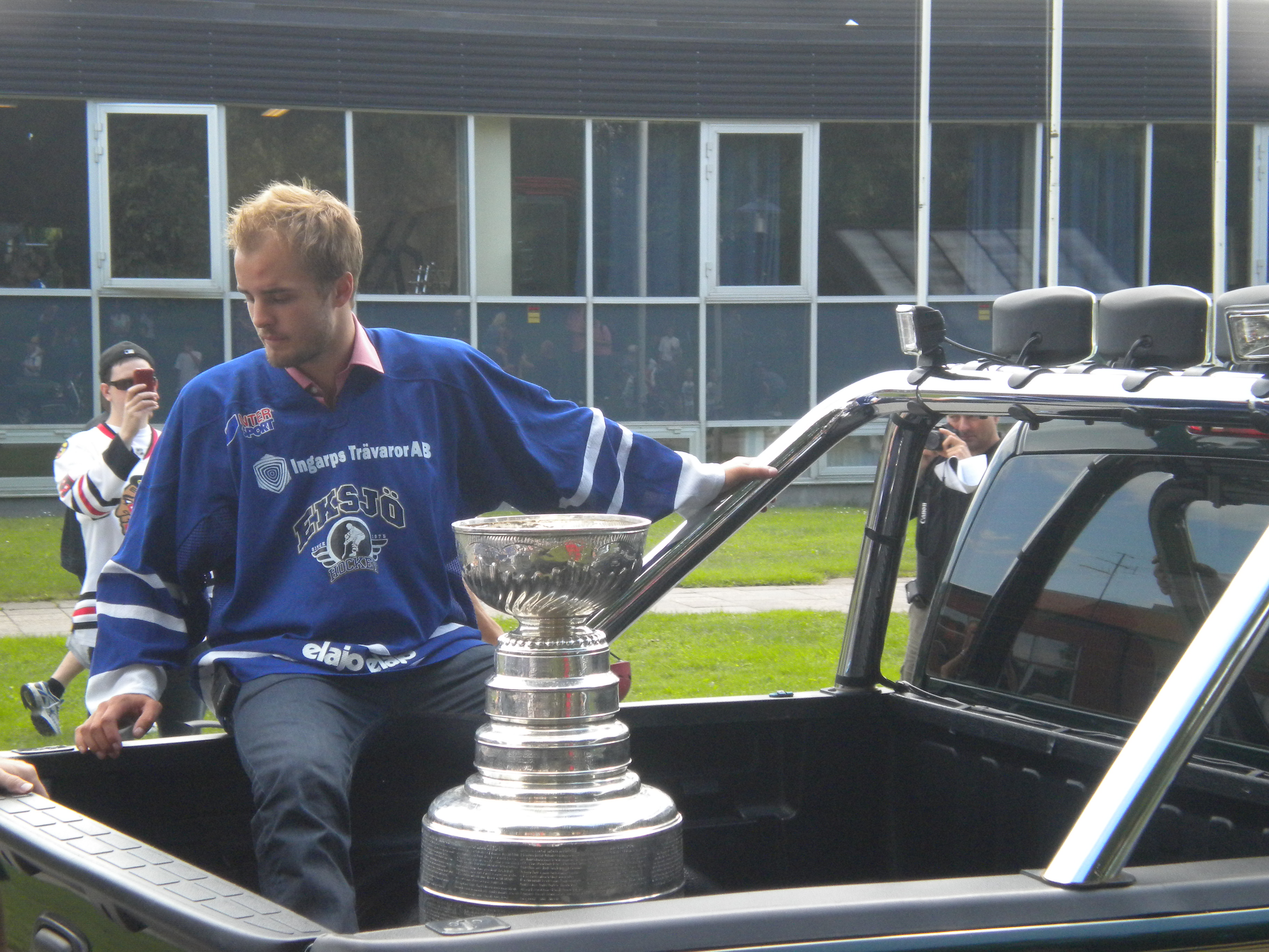 Niklas Hjalmarsson i Eksjö efter Stanley Cup vinsten 2010